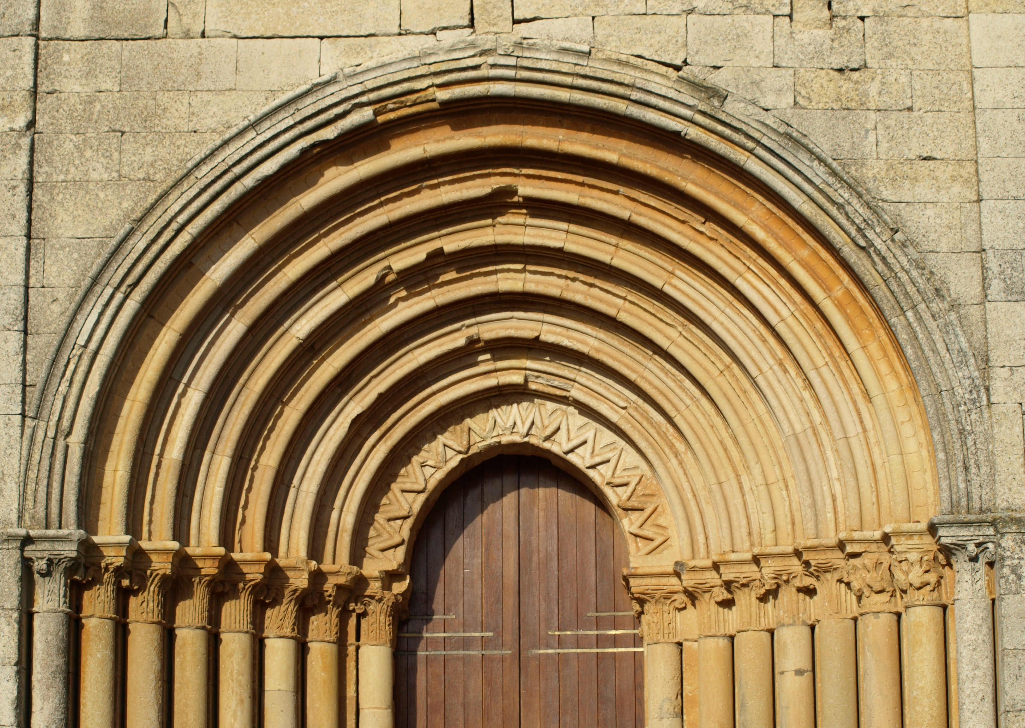 Zorita del Páramo (Palencia). Iglesia de San Lorenzo. Portada occidental